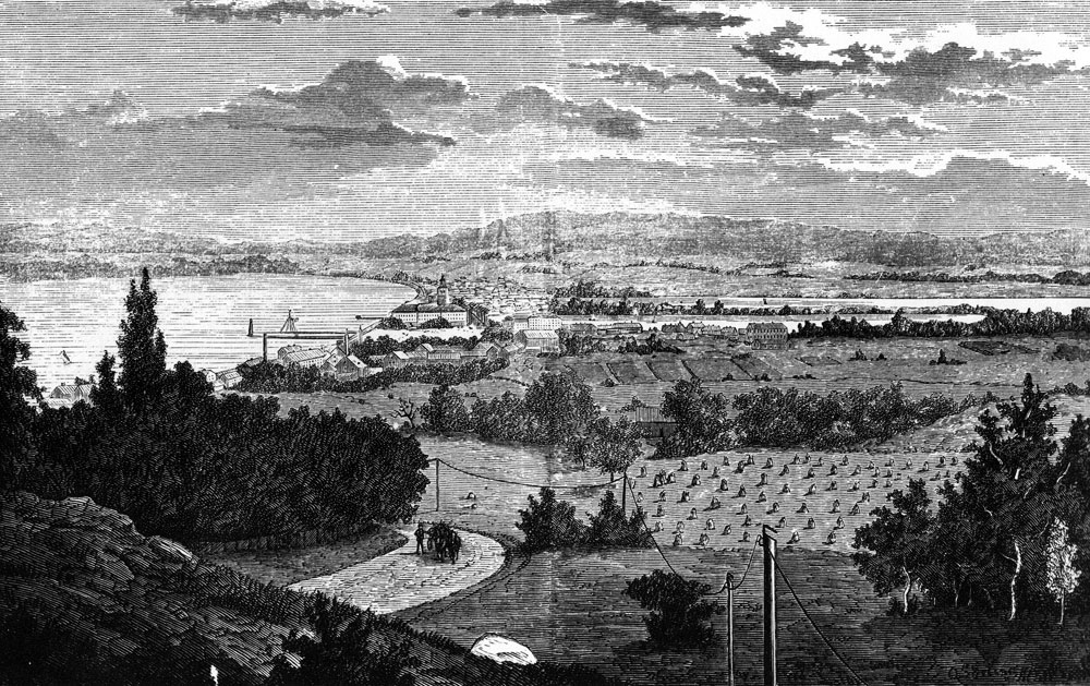 Jönköping